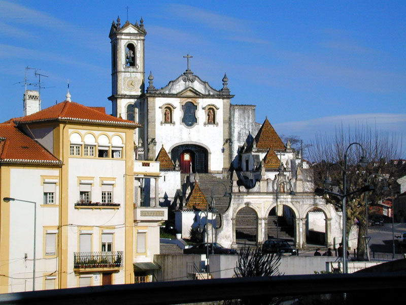 Igreja de Santo António dos Olivias